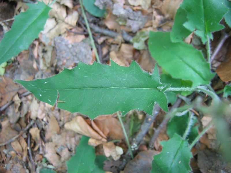 Wald-Habichtskraut Hieracium murorum, Müritz-Gebiet